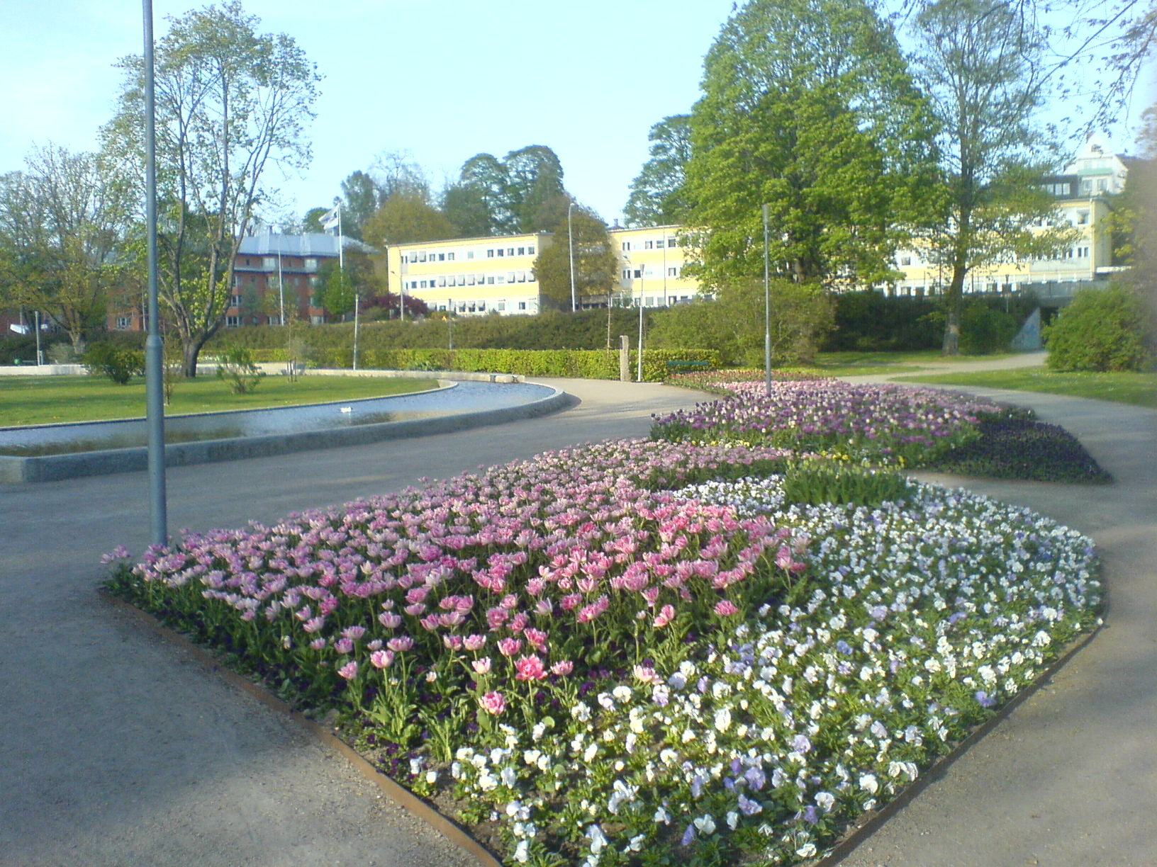 Linnéparken med vattenränna